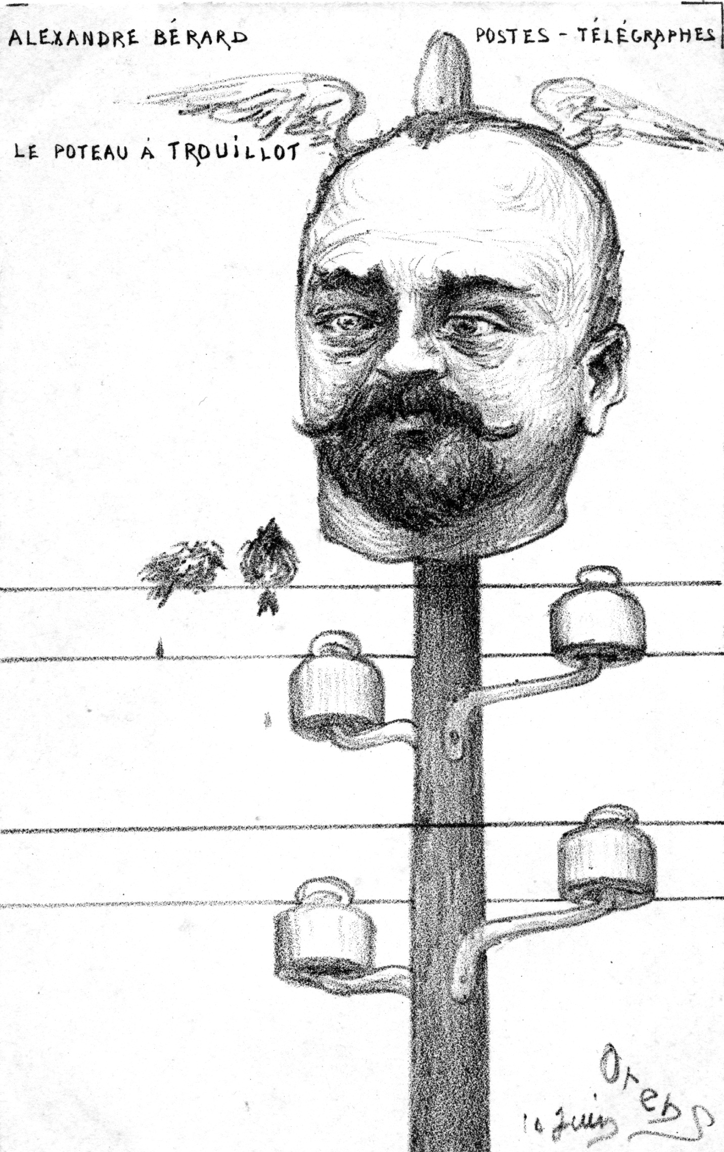 caricature de Bérard par Alphonse Allais